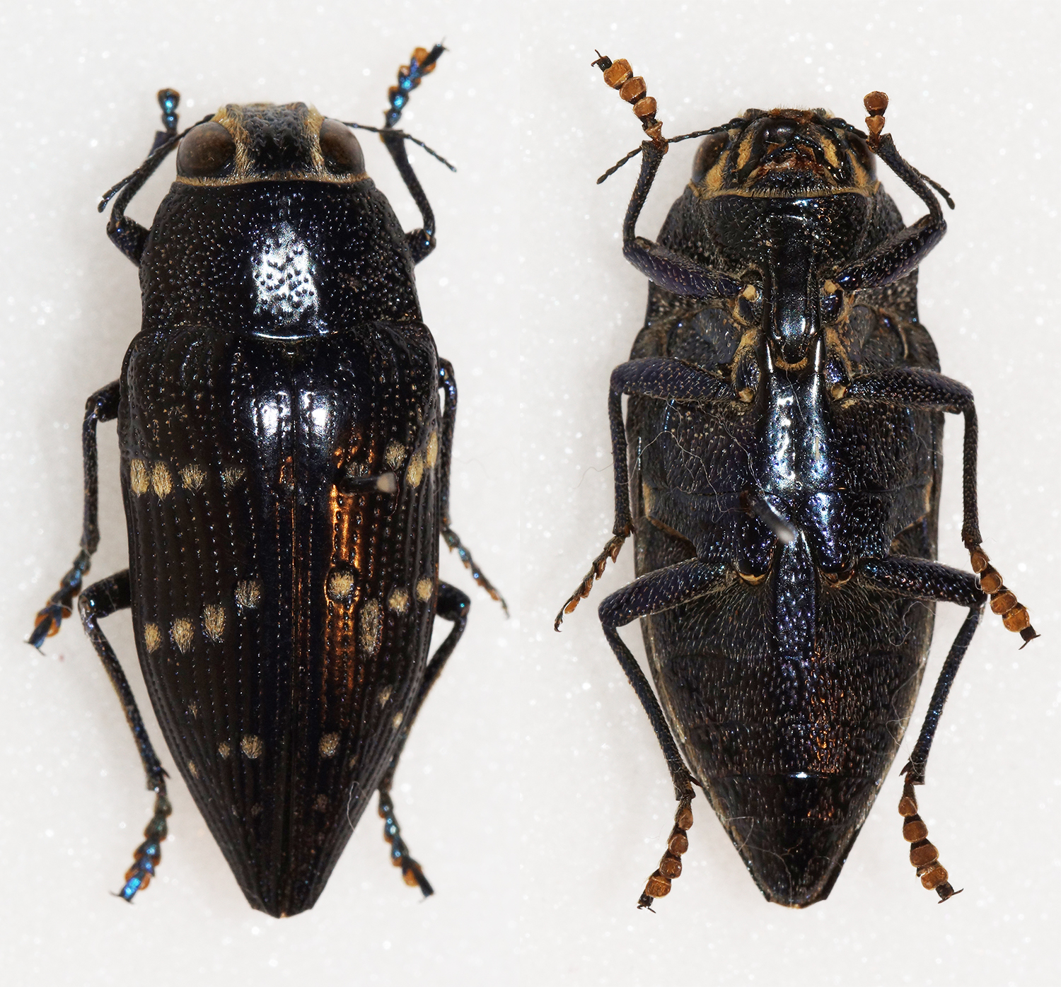 Guérin & Percheson,1835 Sex: ? Data: 02-2014 - Ulapes - La Rioja - Argentina Size: 24.5mm